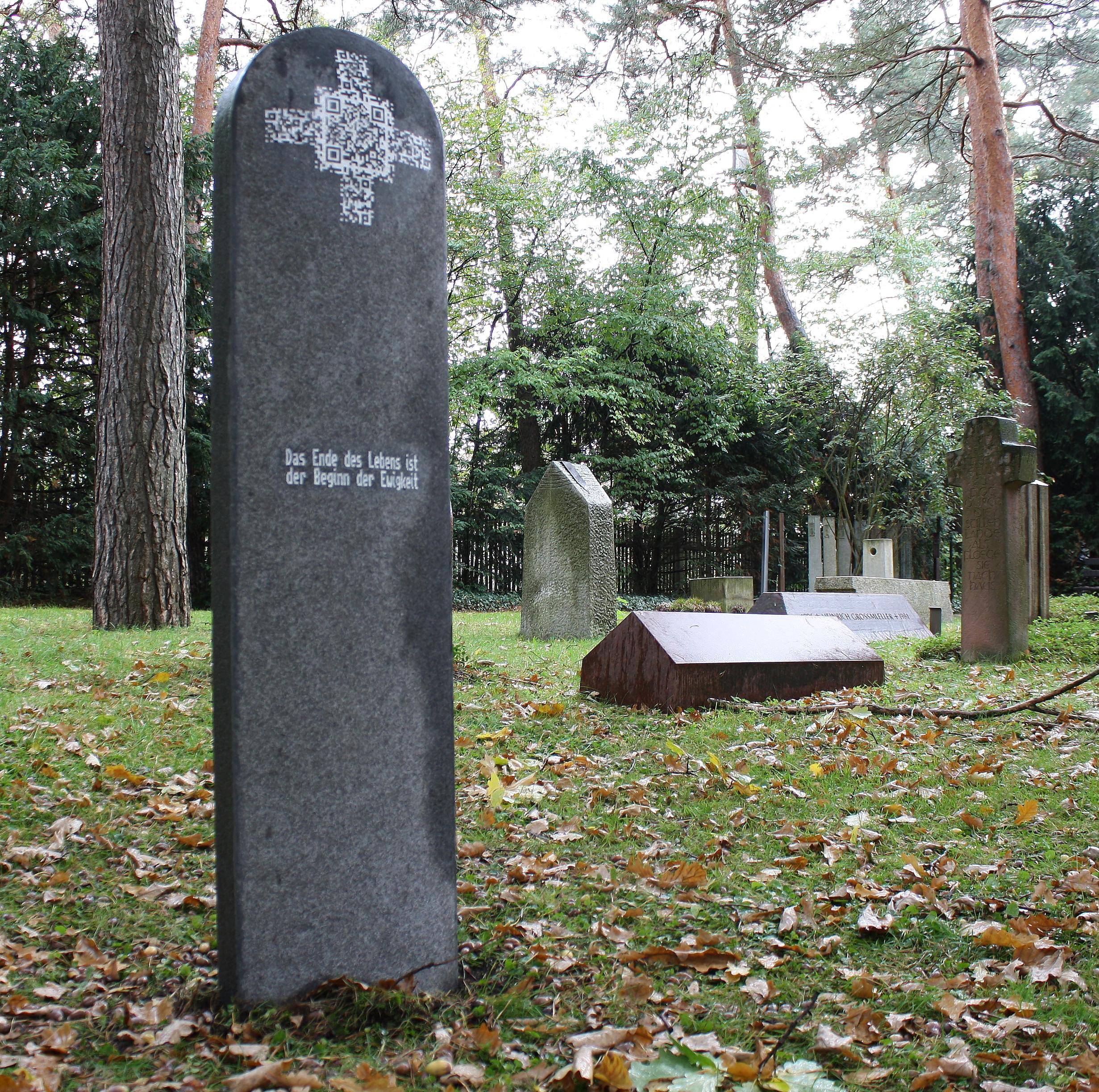 QR-Grabstein. Dieser Grabstein wurde mit einem QR-Code versehen, der vertieft, direkt und dadurch dauerhaft in den Naturstein gearbeitet wurde. Dies ist der weltweit erste eigenständige QR-Grabstein – mit einem, als Kreuzrelief eingearbeiteten 'embedded qr-code'. Dieser Grabstein mit QR-Code wurde 2011 in der Steinmetzwerkstatt des Kölner Bildhauers und Steinmetzmeisters Andreas Rosenkranz erstellt. Der von Ihm geleitete Steinmetzbetrieb 'steinart' präsentierte dieses QR-Grabmal in 2012 einer breiten Öffentlichkeit. 2012_steinart.info